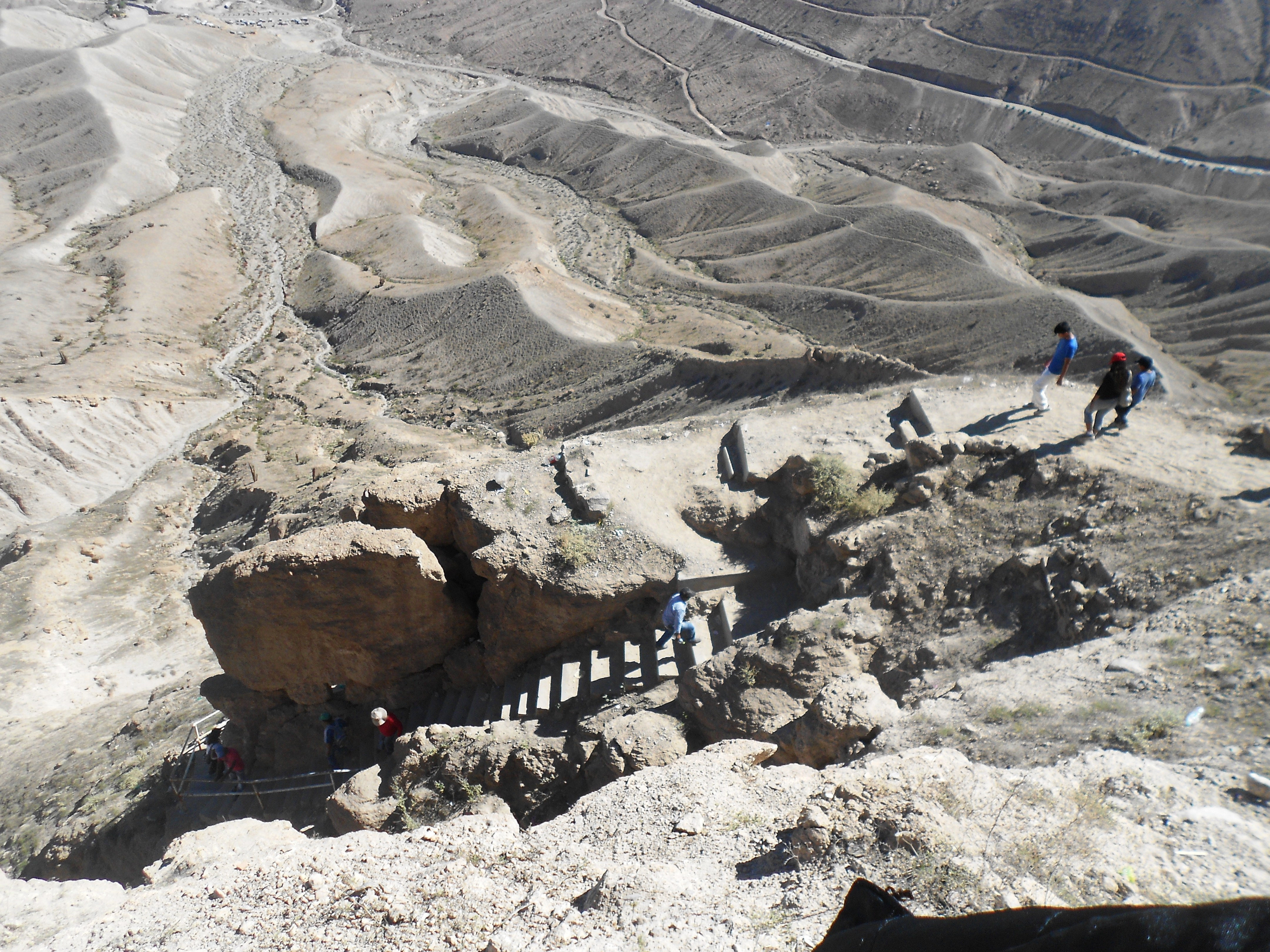 Cerro Baul, Torata, Moquegua